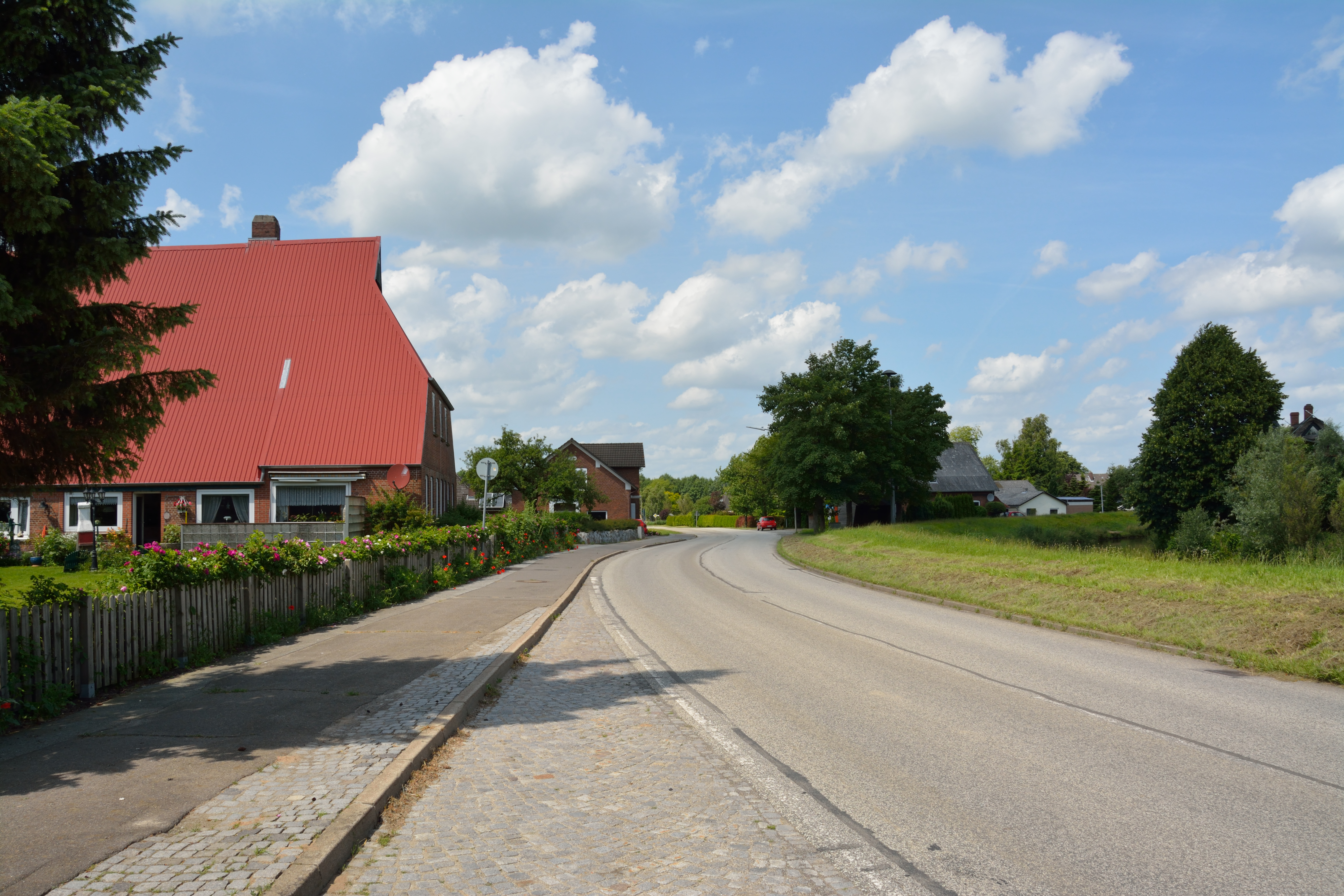 Impression der Hauptstrasse von Brekdorf